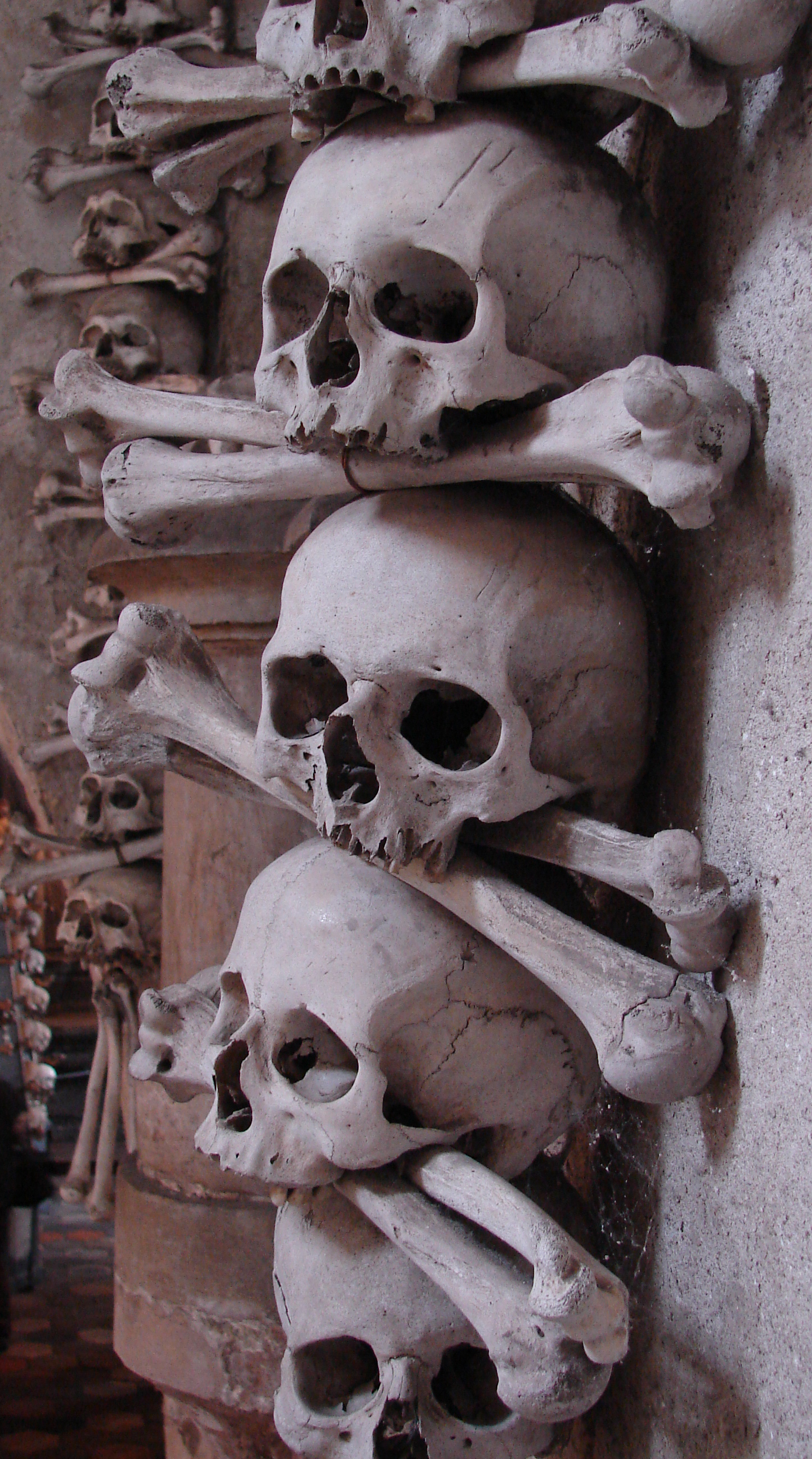 Skeletal Arrangements #2, Sedlec Ossuary